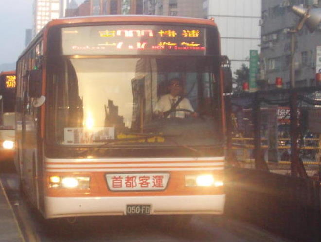 首都客運292路線公車 050FD 2003年HINO